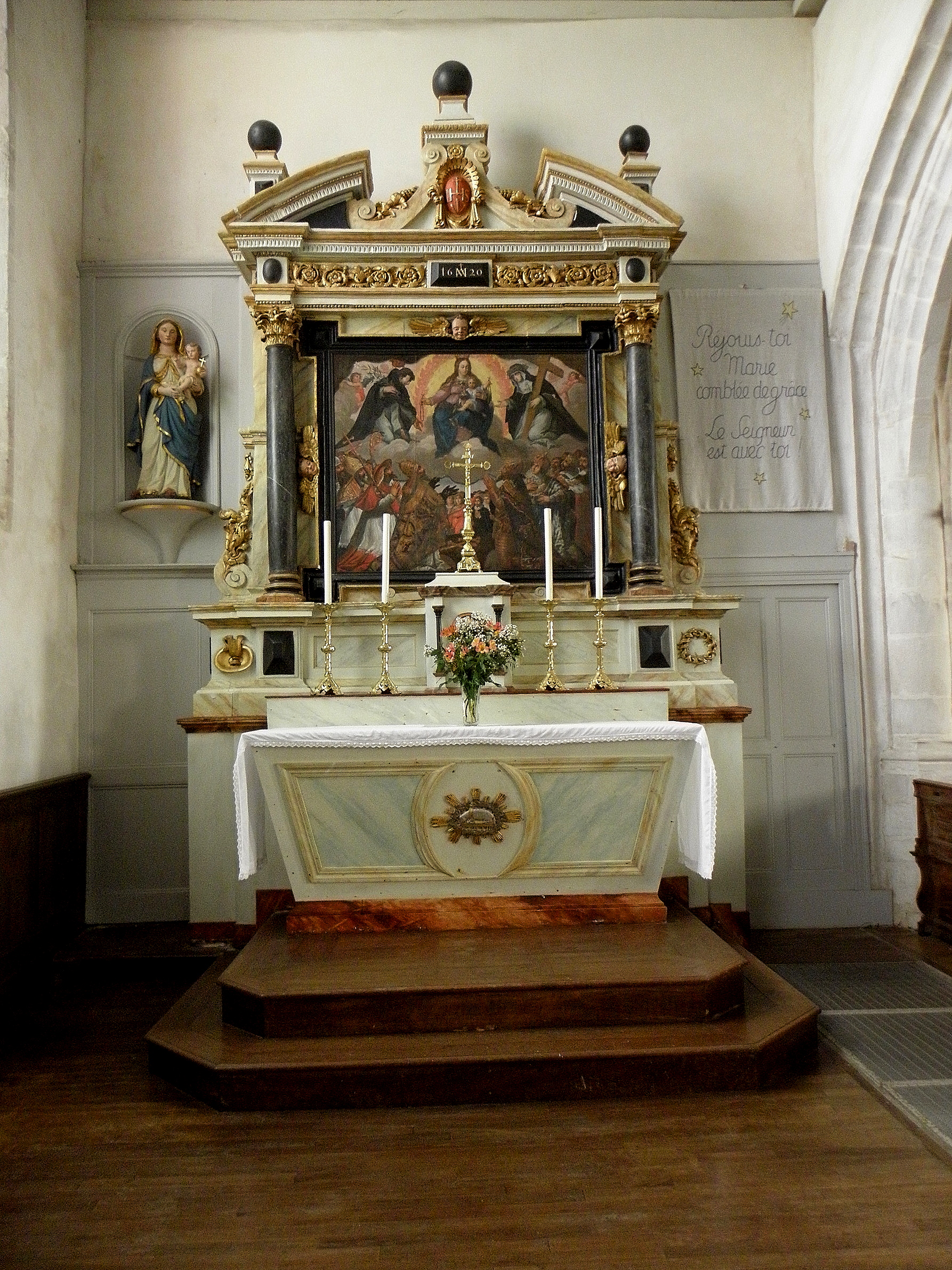 Autel et retable du Rosaire de l'église Saint-Martin de Moutiers (35).